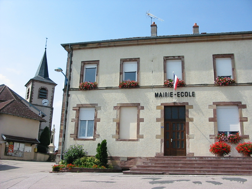 Domptail, commune des Vosges : l'église et la mairie-école.